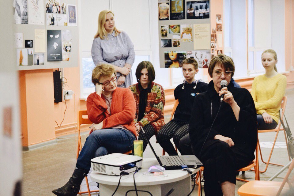 Лекция Саши Обуховой. В АОНБ им. Н. А. Добролюбова (Архангельск)